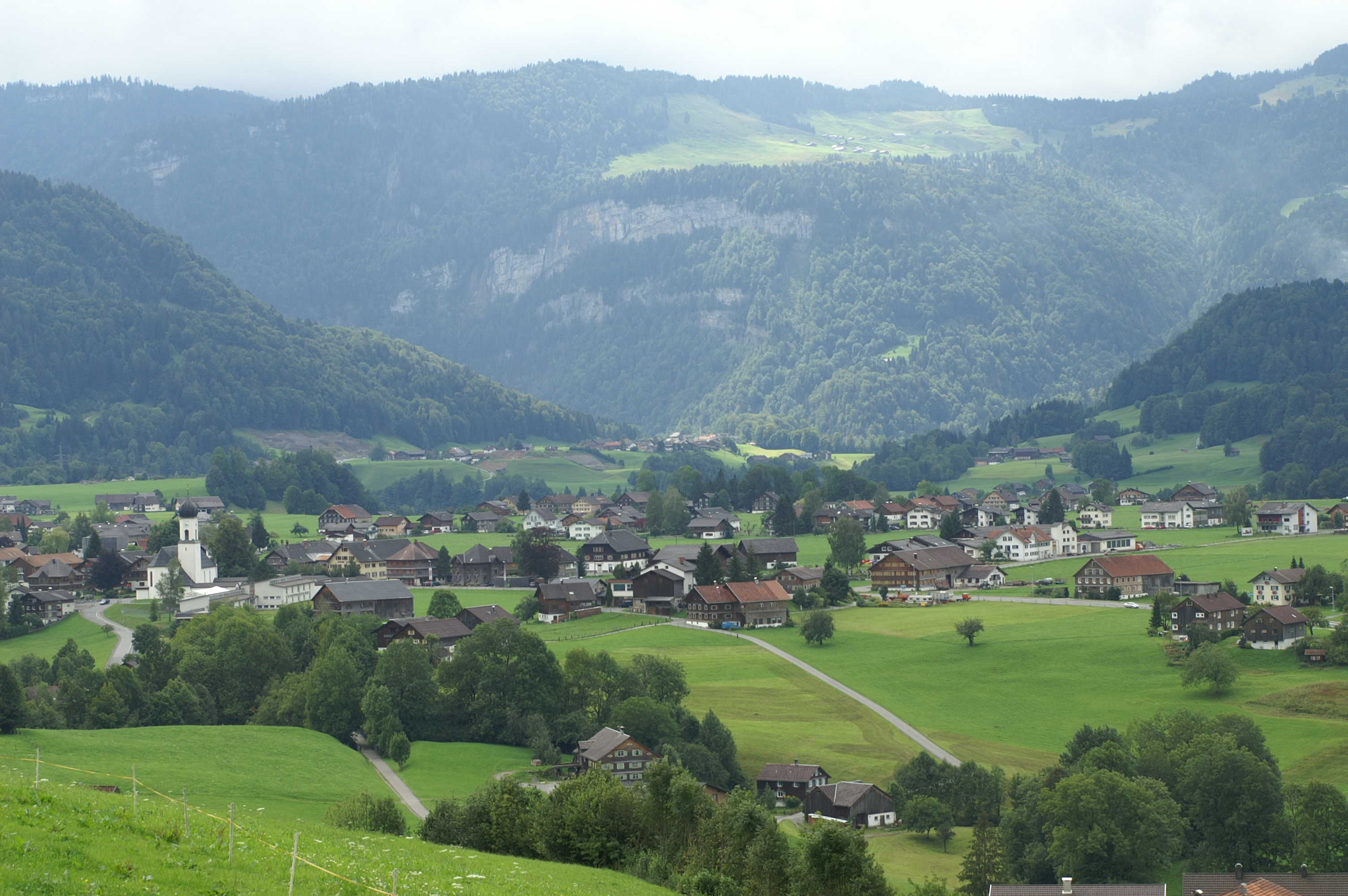 Ortsteil der Gemeinde Andelsbuch